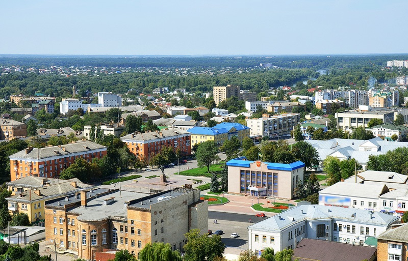 Панорама Торгової площі (Біла Церква)